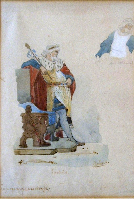 Bacchus